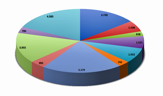 bevolking van Aa en Hunze (25580) in 2007 verdeeld over Annen (3.720) Eext (1.438) Schipborg (618) Gasselte (1.621) Gasselternijveen (1.952) Gasselternijveenschemond (745) Gieten (5.179) Gieterveen (995) Rolde (3.955) Grolloo (795) Overig (4.583) - gebaseerd op gegevens van de gemeente Aa en Hunze